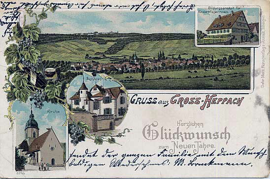 „Gruß aus Großheppach“. Mehrbildpostkarte aus dem Verlag Gebrüder Metz. 1, Gesamtansicht 2. Bildungsanstalt für Kinderpflegerinnen 3. Schloss 4. Kirche.